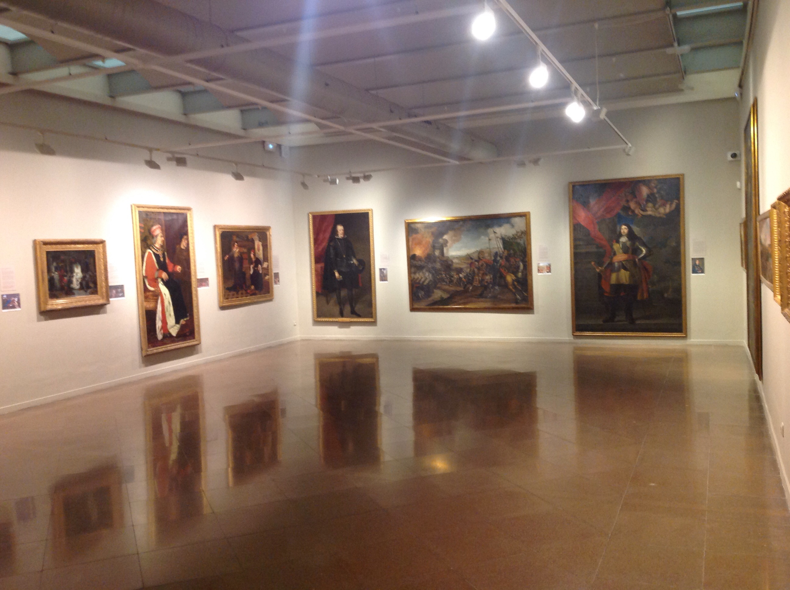 La pintura històrica de les col·leccions de BMVB- exposició temporal